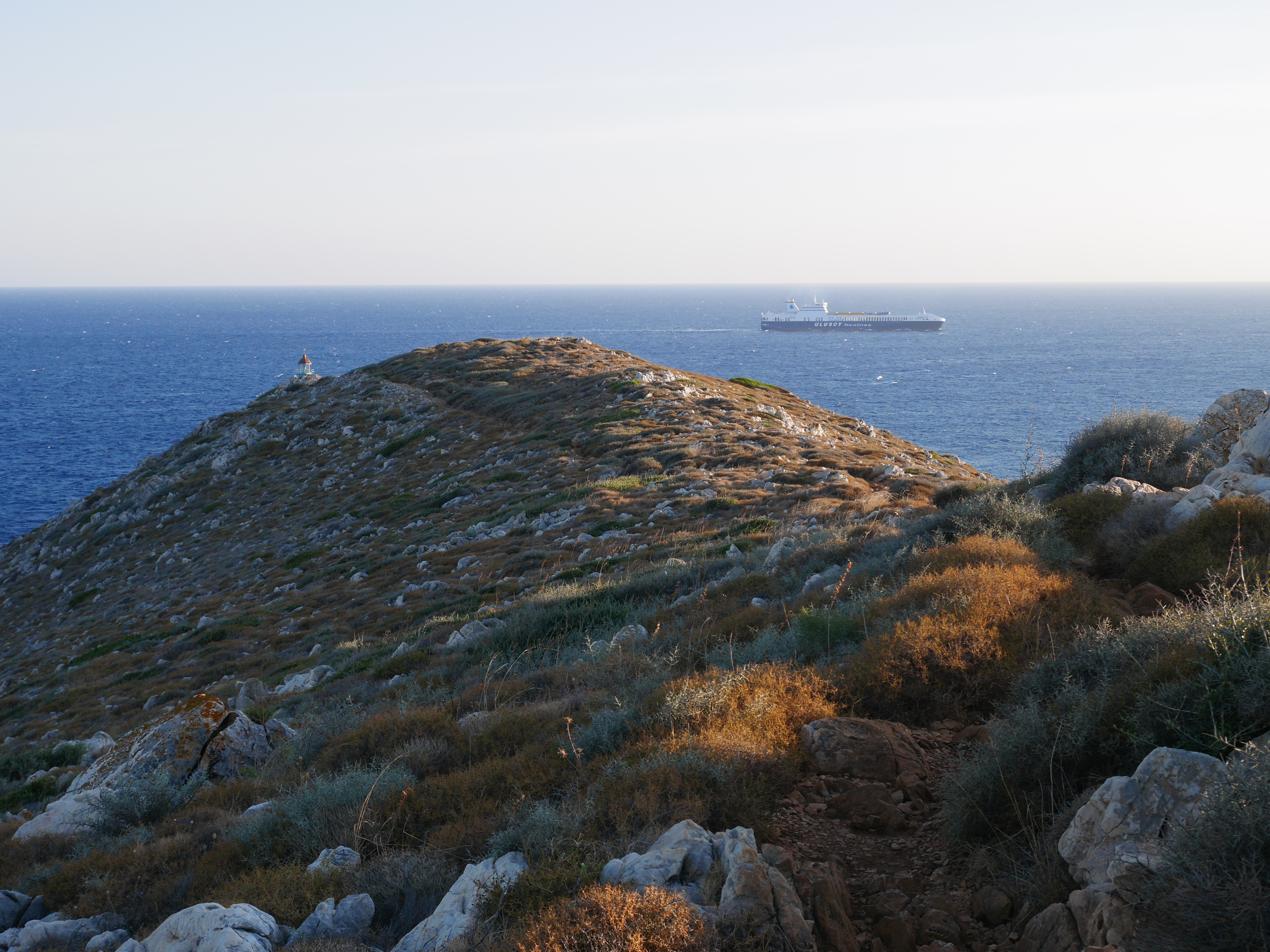 Le cap Matapan ou Ténare (Ακρωτήριο Ταίναρο)